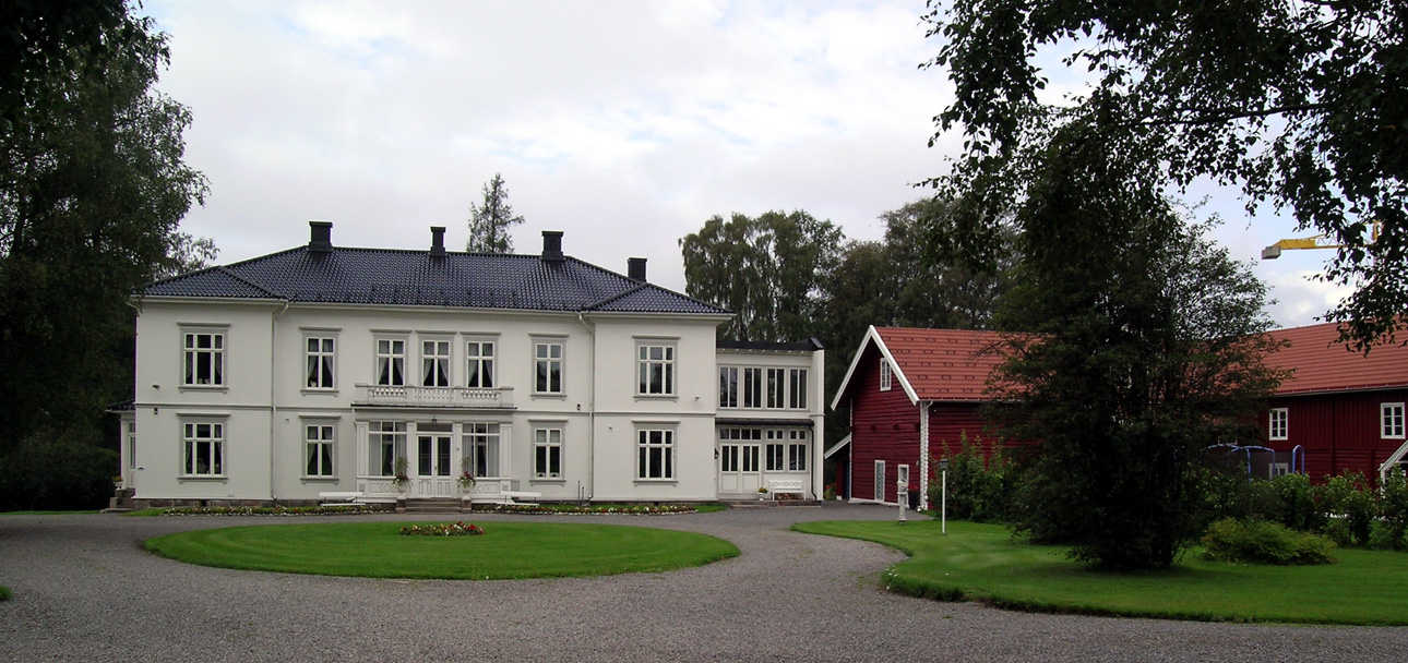 Gårder farm, Elverum, Norway.